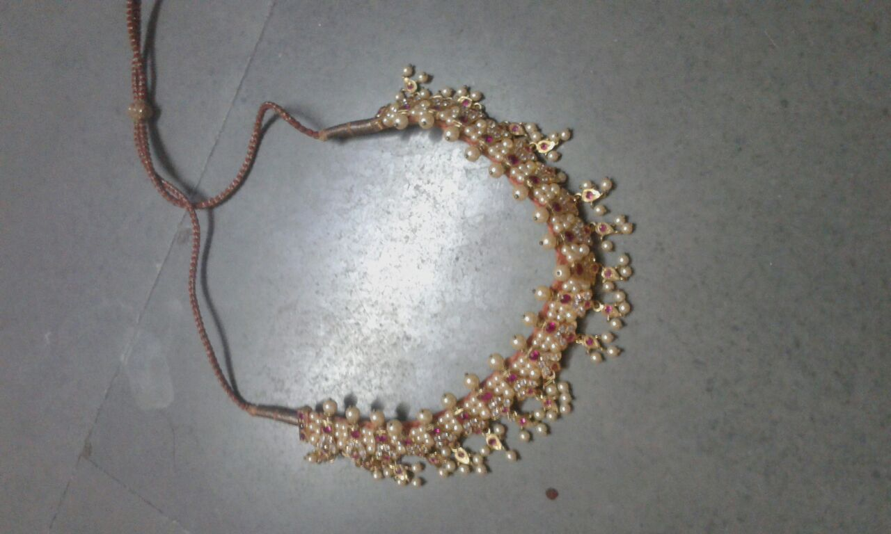 चिंचपेटी